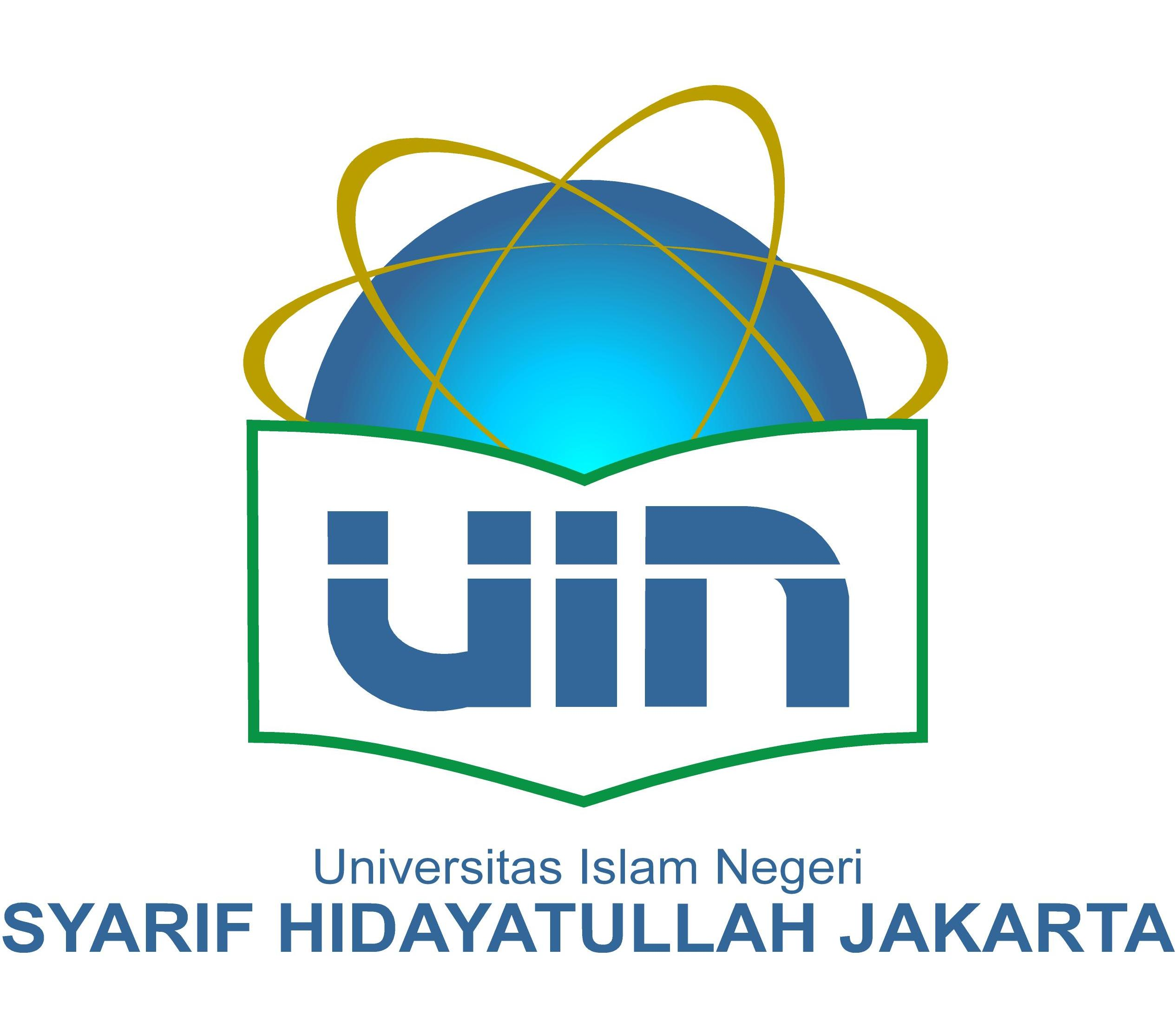 Logo UIN Syarif Hidayatullah Jakarta